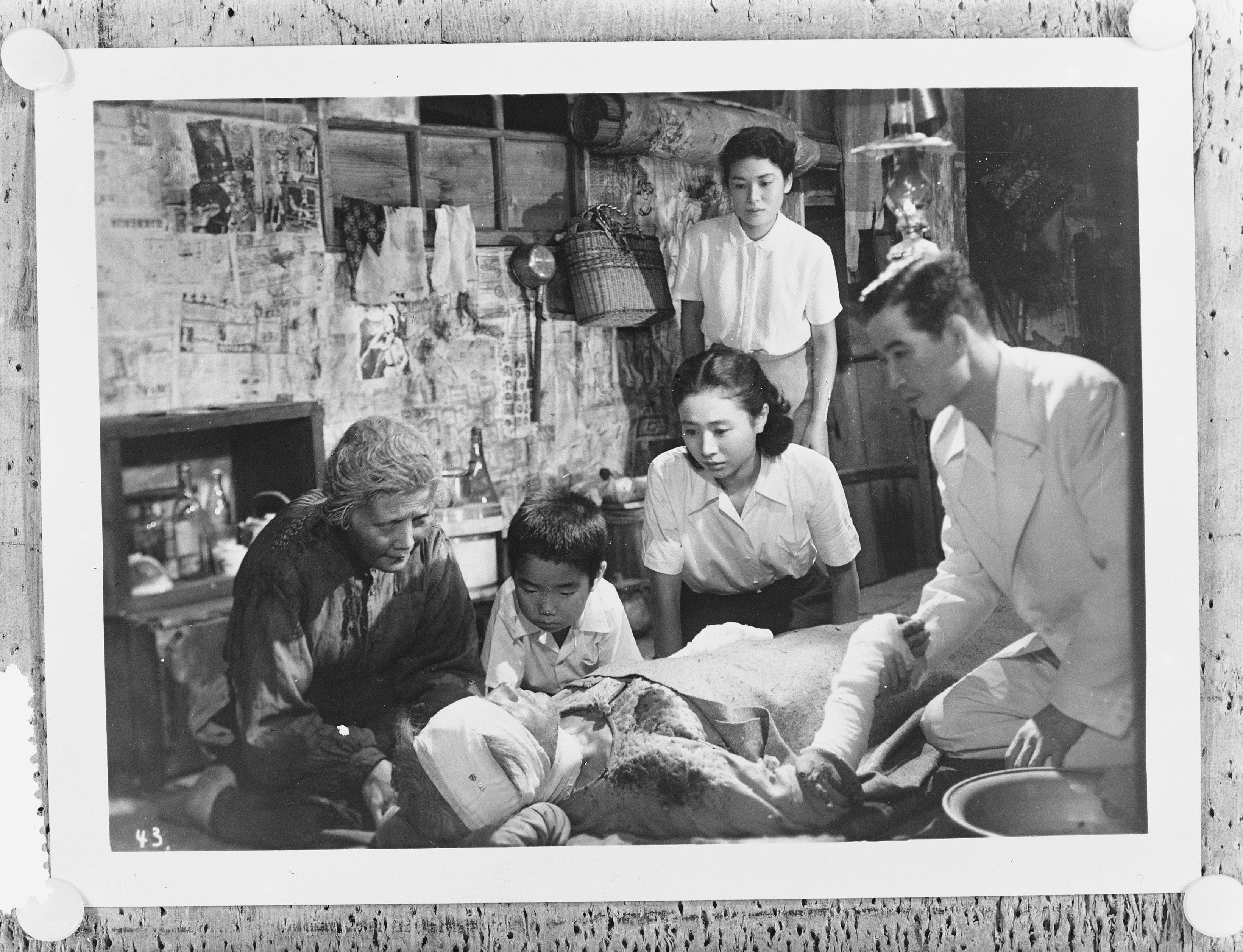 Collectie / Archief : Fotocollectie Anefo Reportage / Serie : [ onbekend ] Beschrijving : Reprodukties Hiroschima (Royal Film) Datum : 4 maart 1954 Locatie : Hiroshima Trefwoorden : FILM, Reprodukties Persoonsnaam : ROYAL Fotograaf : Doka / Anefo Auteursrechthebbende : Nationaal Archief Materiaalsoort : Glasnegatief Nummer archiefinventaris : bekijk toegang 2.24.01.09 Bestanddeelnummer : 906-3244